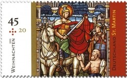 Weihnachtsmarke 2011 St. Martin